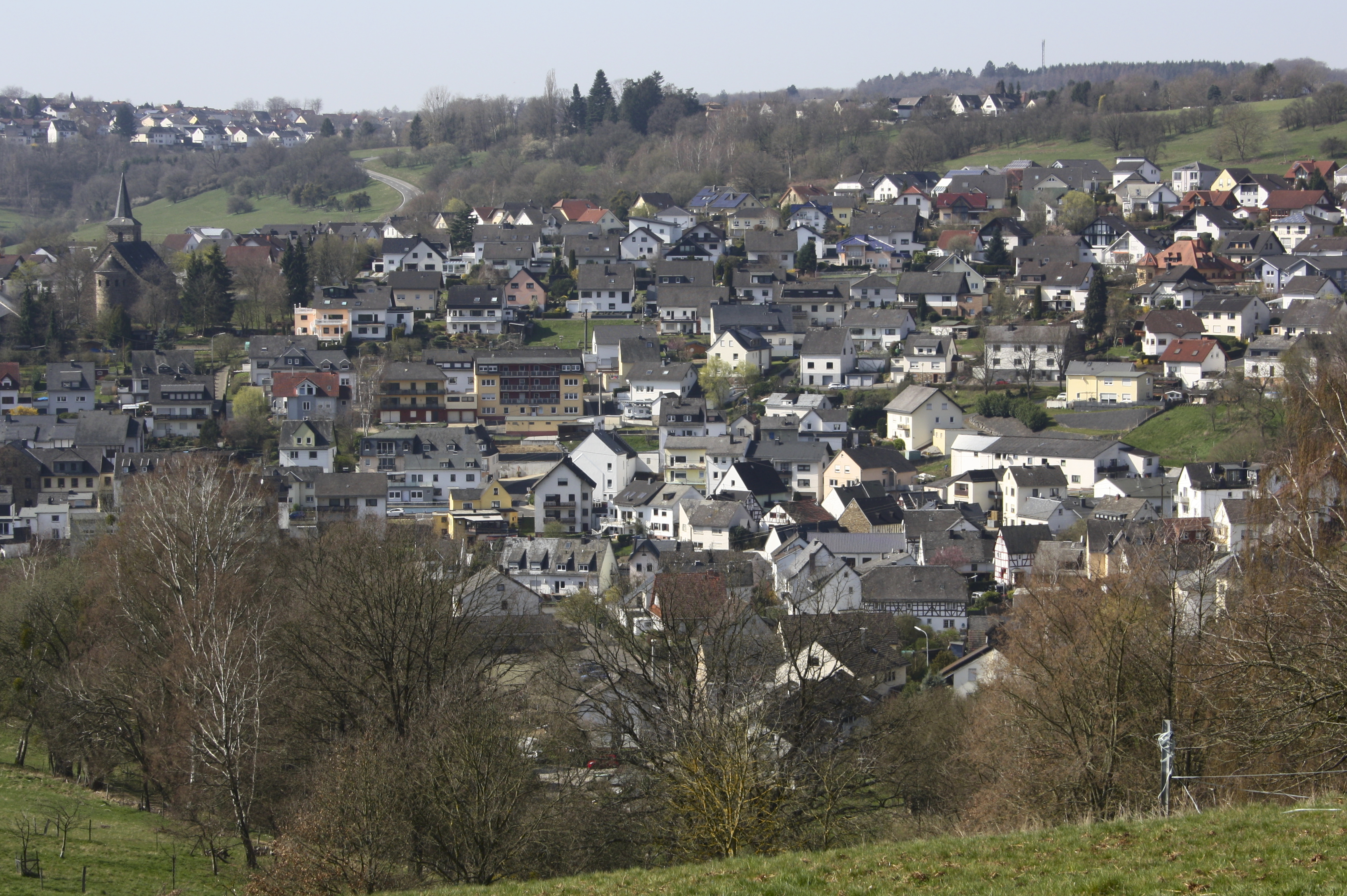 Kadenbach, Westerwaldkreis, Rheinland-Pfalz, Deutschland